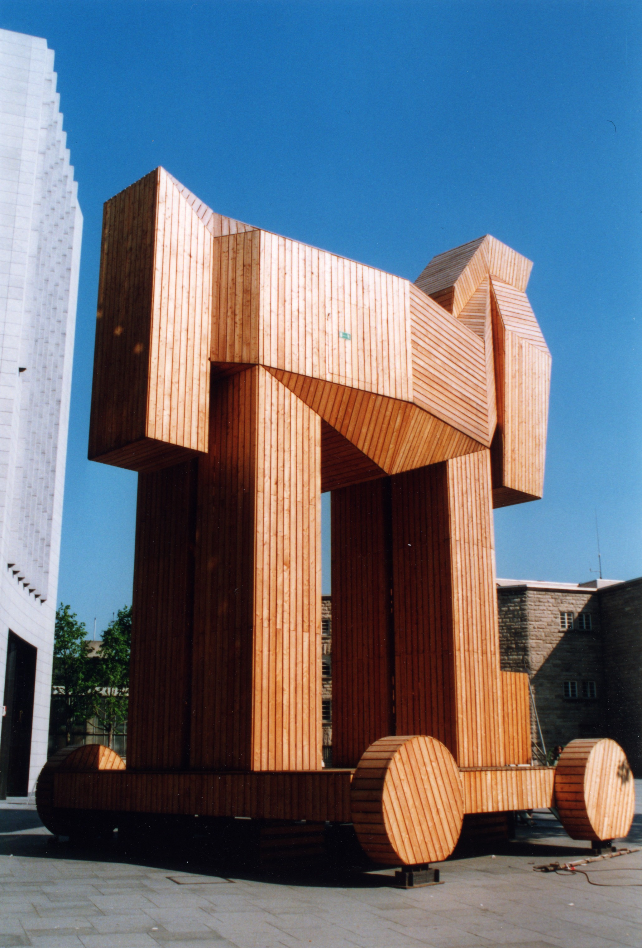 Trojan Horse in Stuttgart 2001, Nachbau des Trojanischen Pferds bei der Troja-Ausstellung in Stuttgart, Mai 2001; es war die kulturhistorische Ausstellung «Troia - Traum und Wirklichkeit»